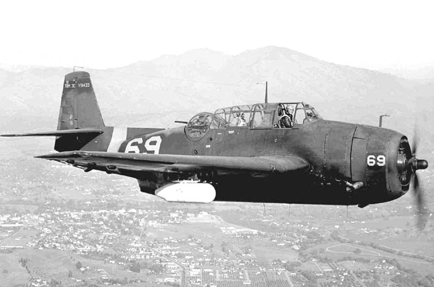 TBM-3E Oakland Reserve